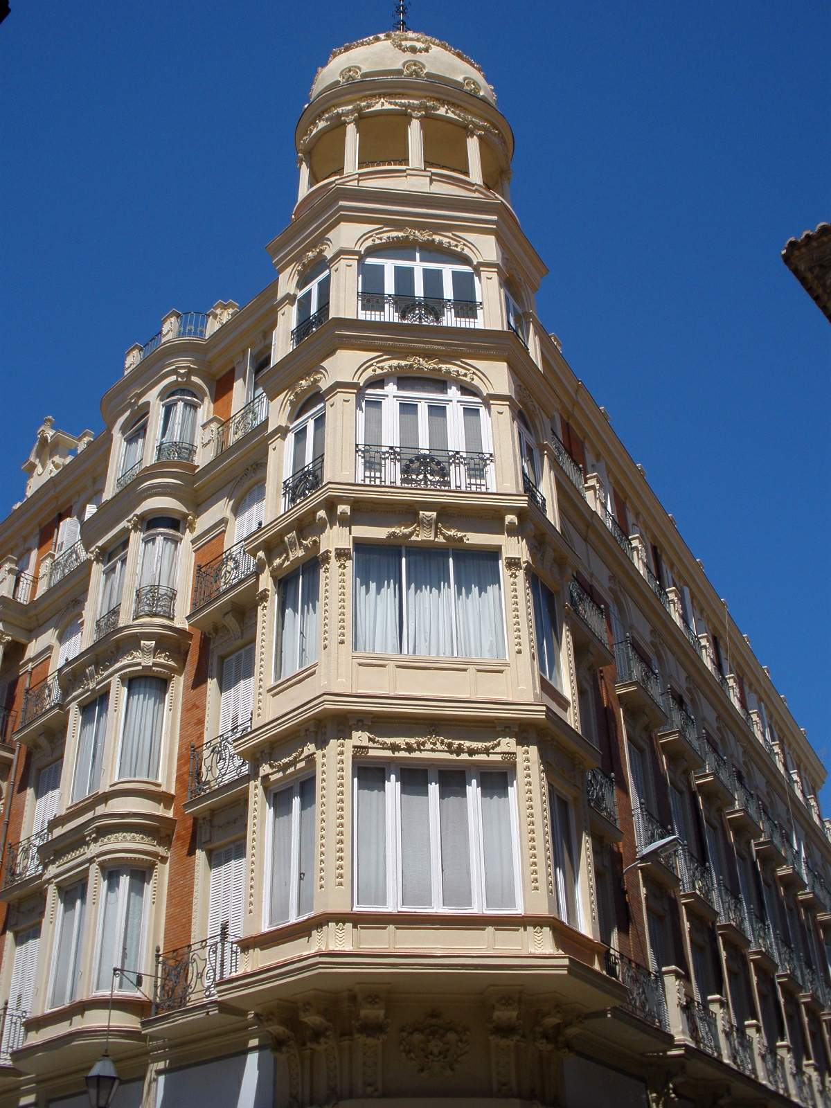 Palencia